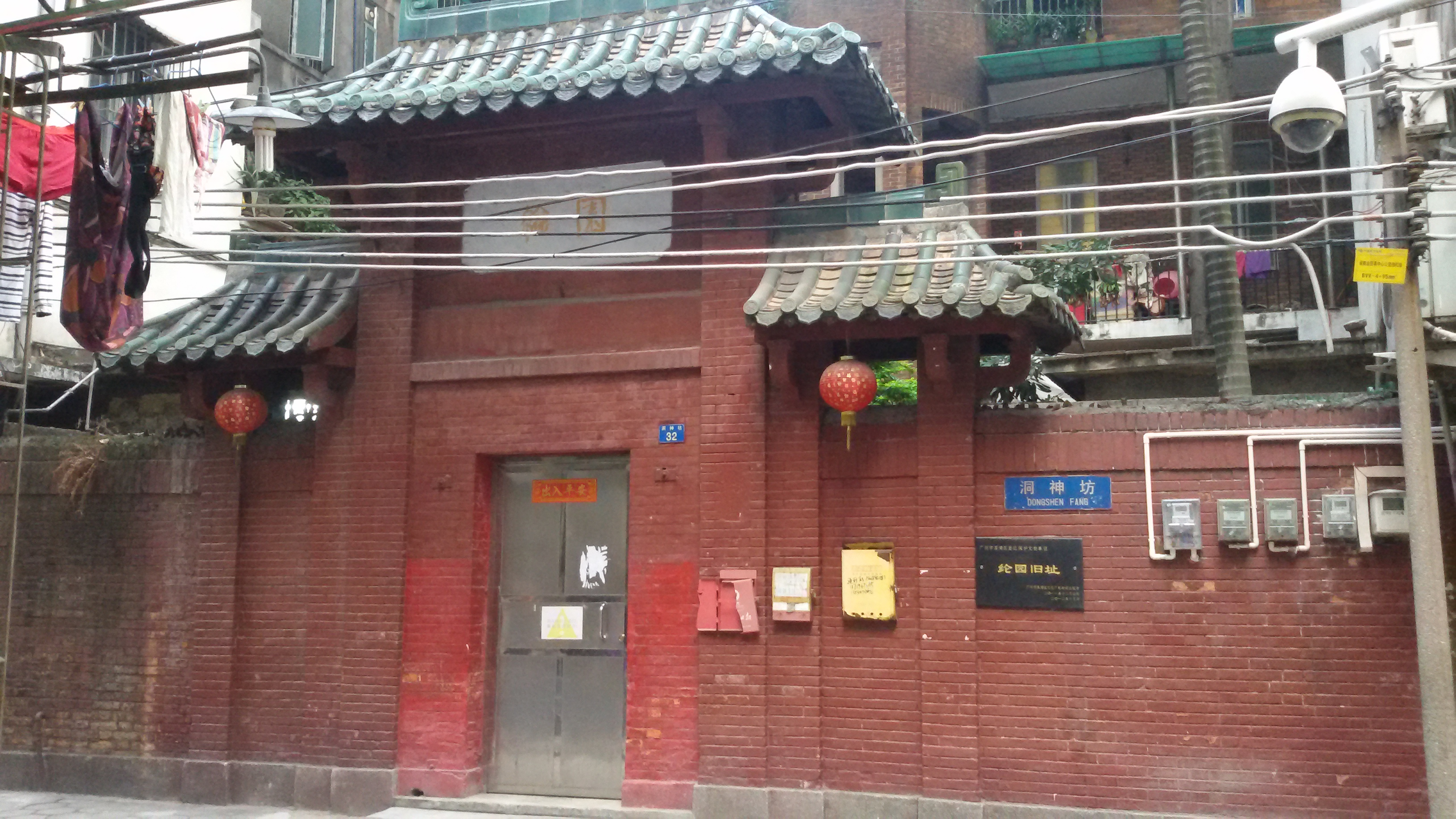 粵語: 綸園舊址同洞神坊嘅巷牌